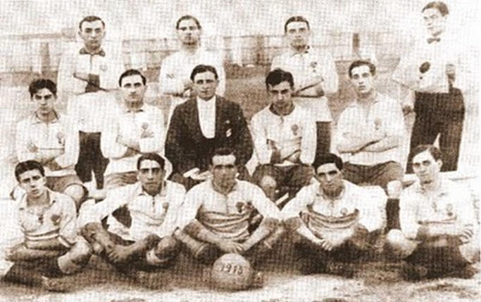 Plantel Huracan 1915 Arriba: Domingo Alberti, Francisco Pazos y Alfredo Spalazzo. Medio: Juan Laurenzano, Bassadone, Norberto Carabelli y Pedro Martinez. Abajo: Acevedo, Jose Laguna, Donato Abbatangelo, Martin Salvarredi y Luis Caldera.